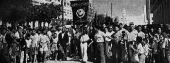 Le jour de l'indépendance (20 mars 1956) à Tunis, Tunisie